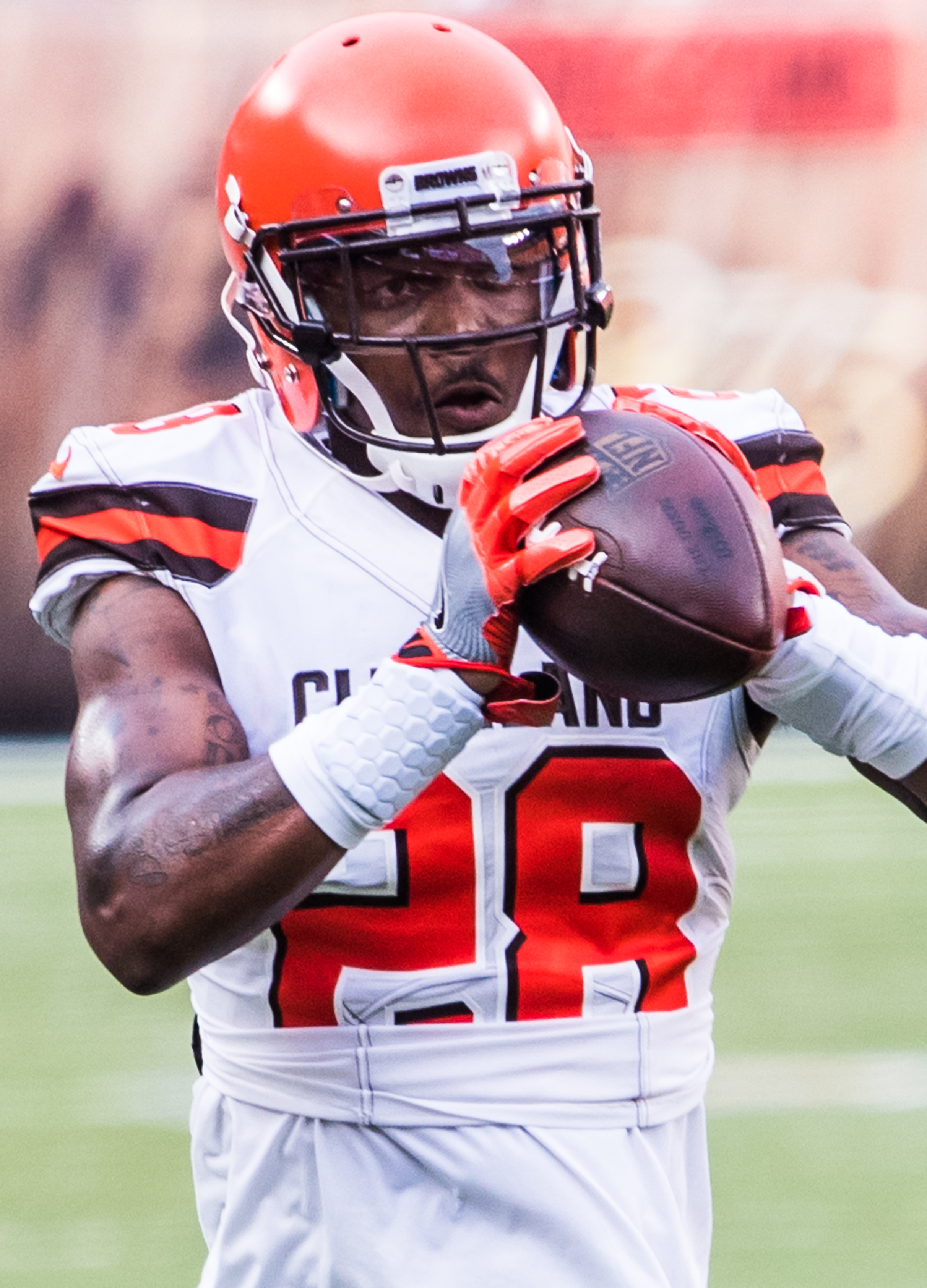 E.J. Gaines